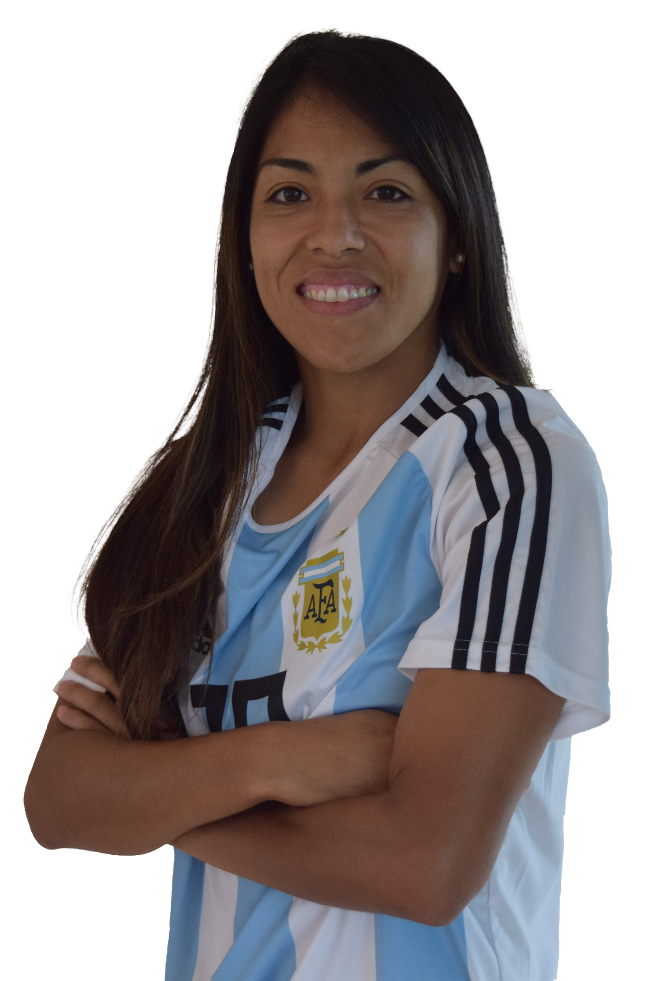 Miriam Mayorga, jugadora de la selección mayor femenina de fútbol de Argentina.Foto sacada previo al primer partido del repechaje por un lugar para el mundial de futbol femenino de Francia 2019